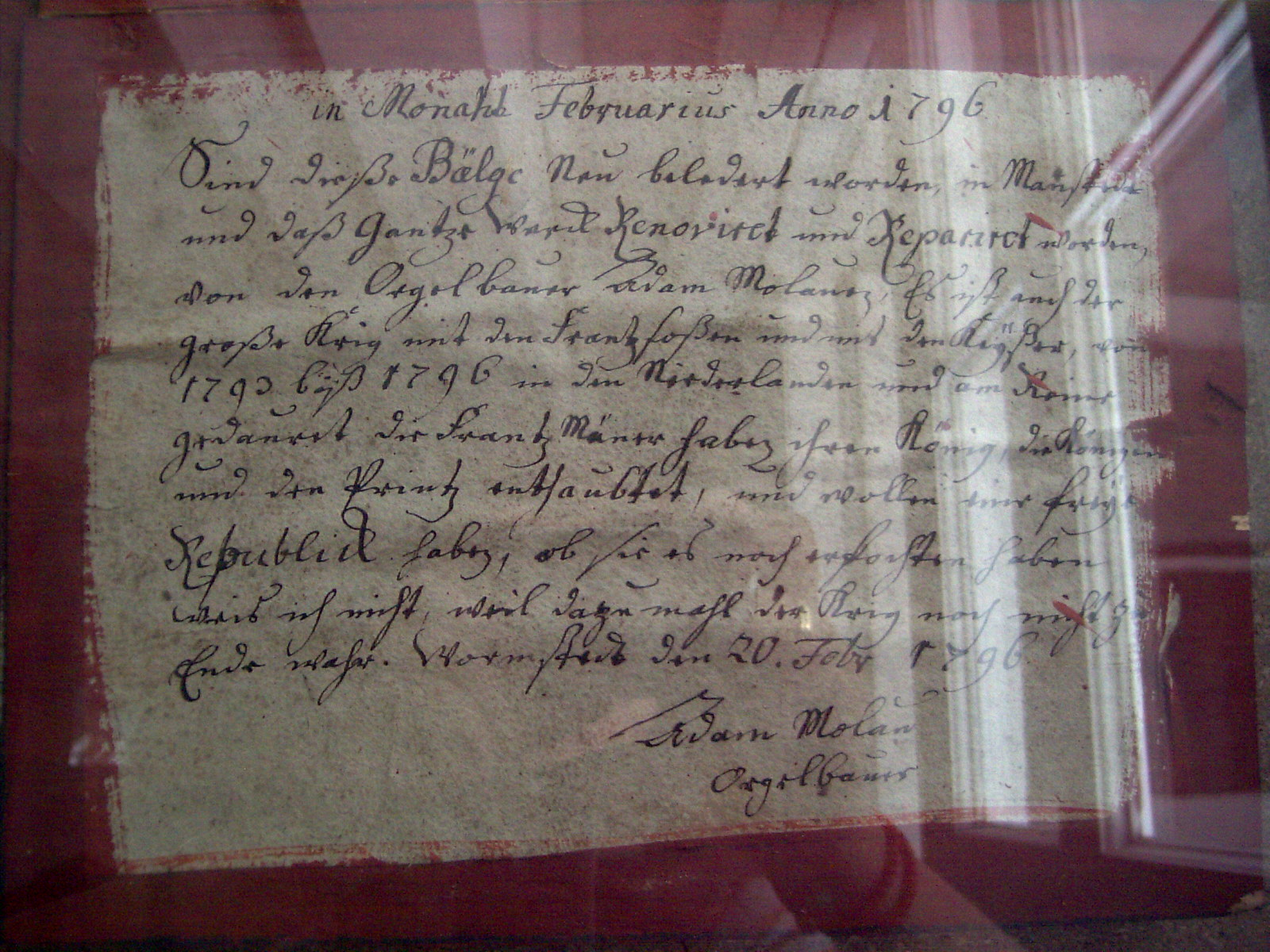 Wormstedt